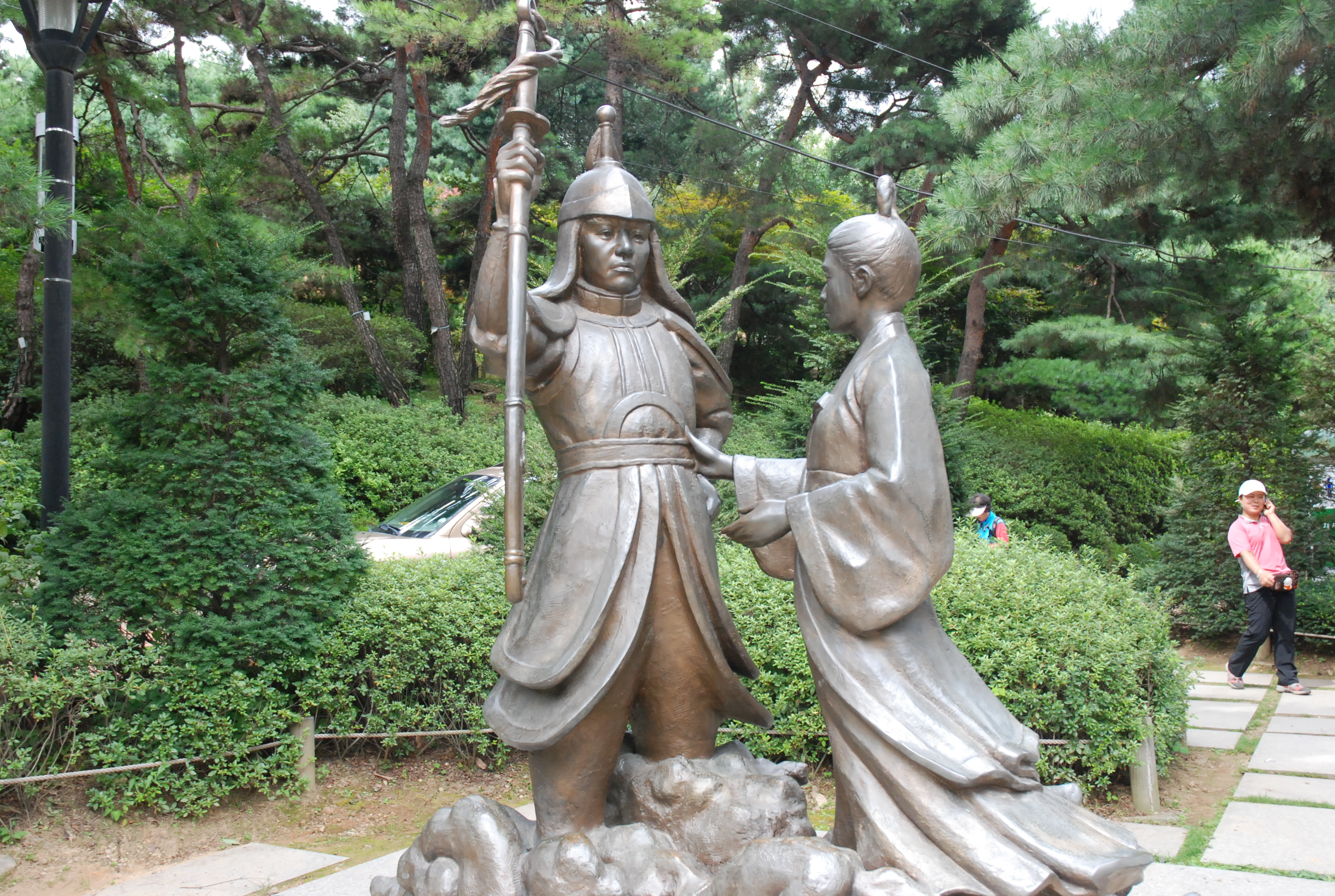 평강공주와 온달장군 조형물